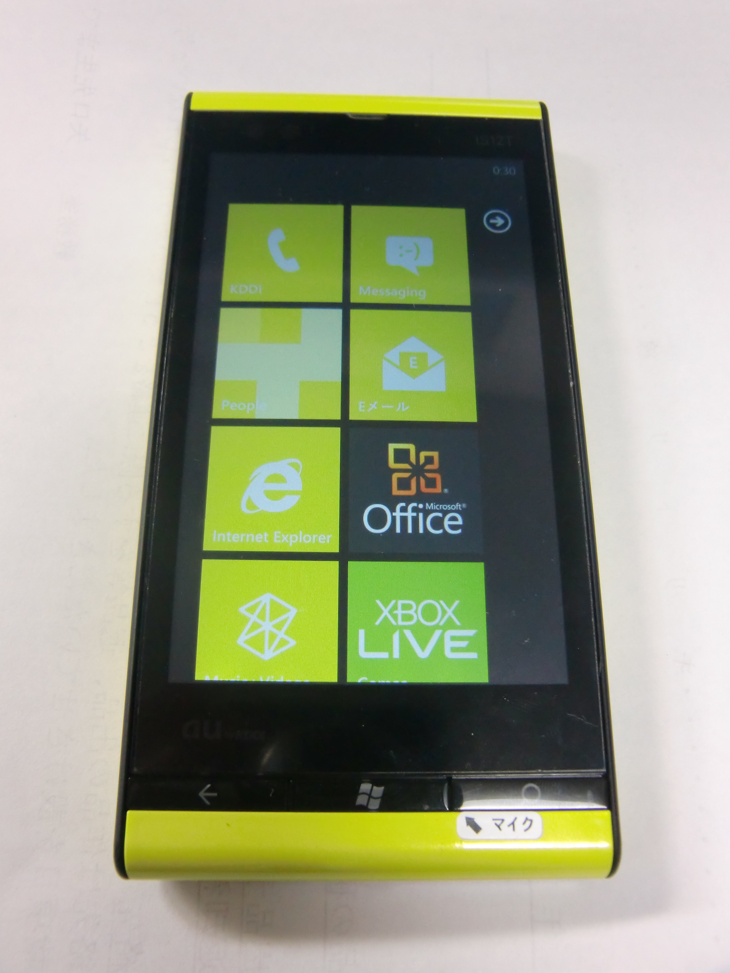 Windows Phone IS12T (KDDI)の前面画像です。